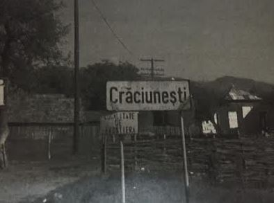 השלט בכניסה לעיירה קרטש'ונשטי במחוז מרמורש ברומניה